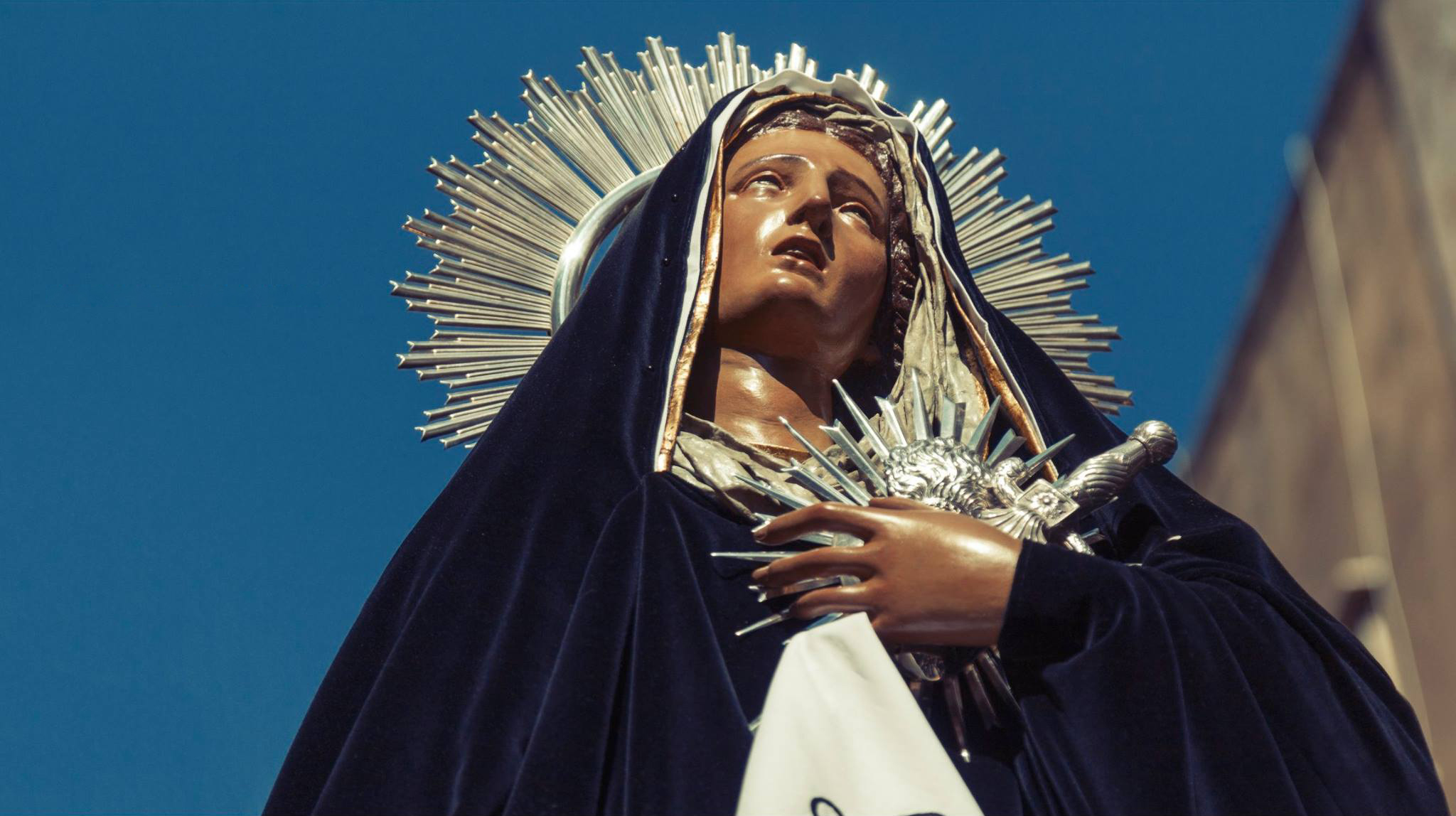 Maria Addolorata